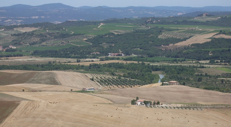 La parte terminale della Val d'Orcia tra le province di Grosseto (in basso sotto il fiume) e Siena (in alto sopra il fiume), Tuscany (Italy)